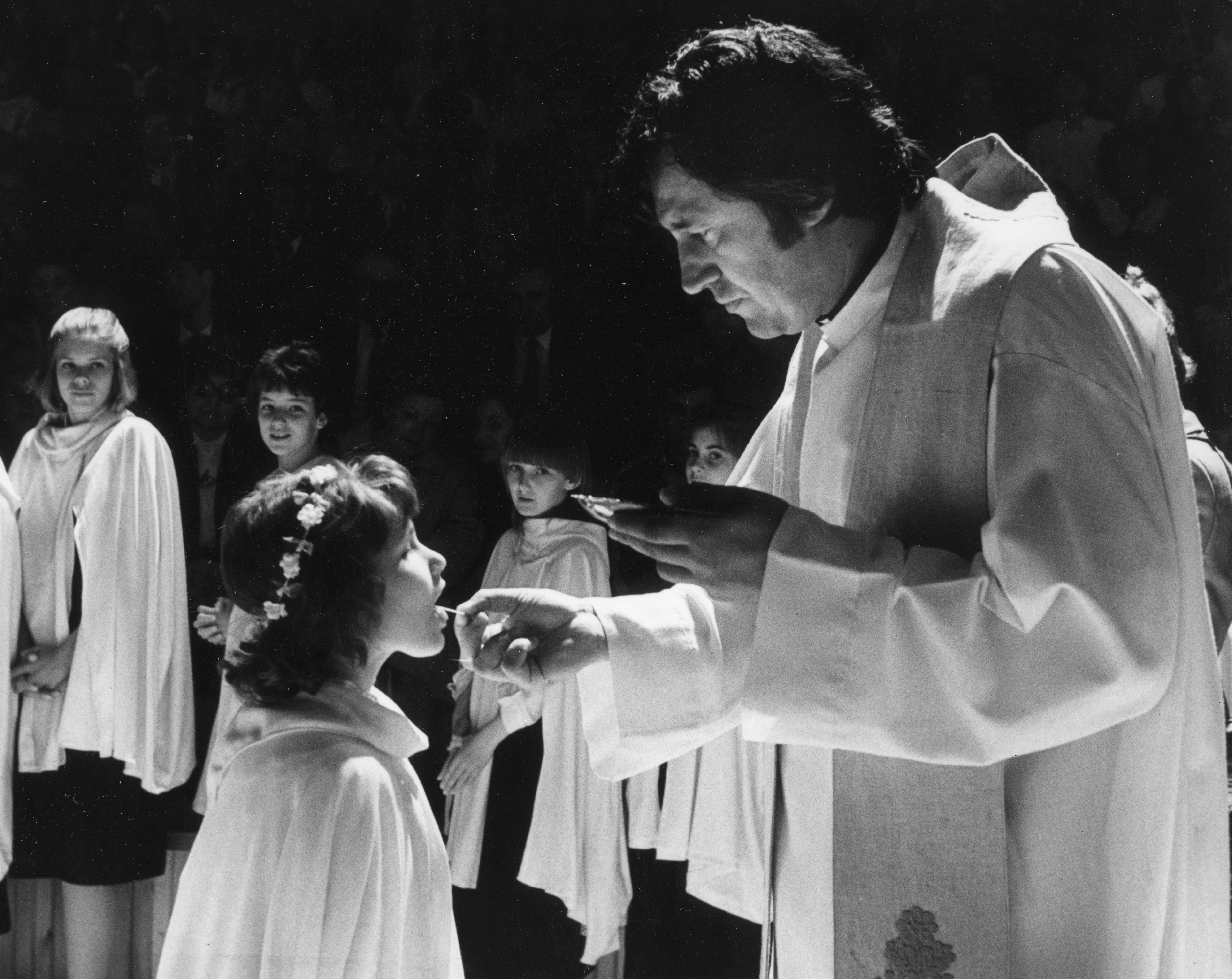 elsőáldozás. Lipp László római katolikus pap, közismert nevén László atya.